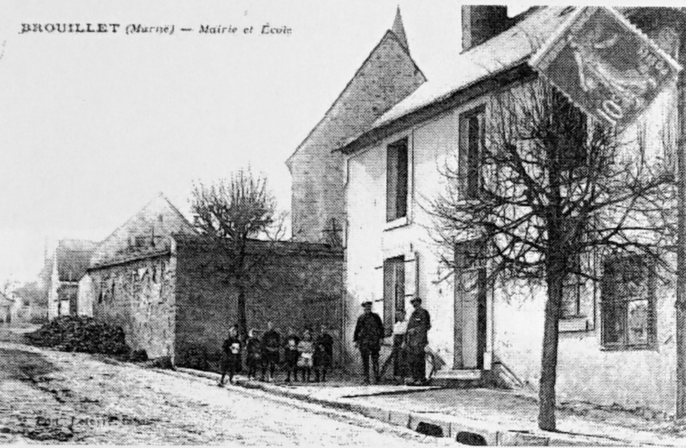 sur une vue ancienne.